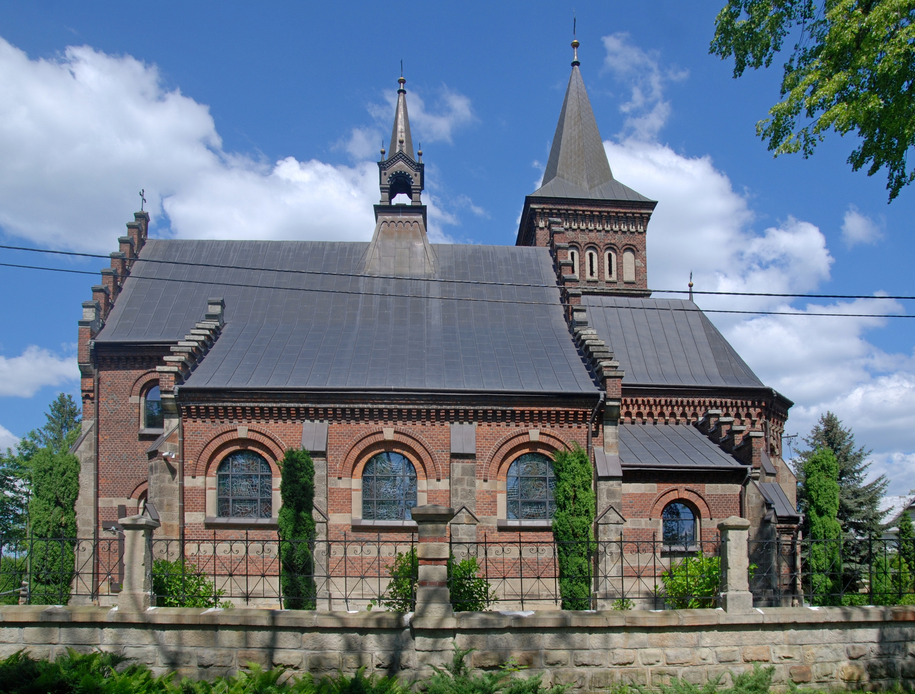 wieś Bruśnik